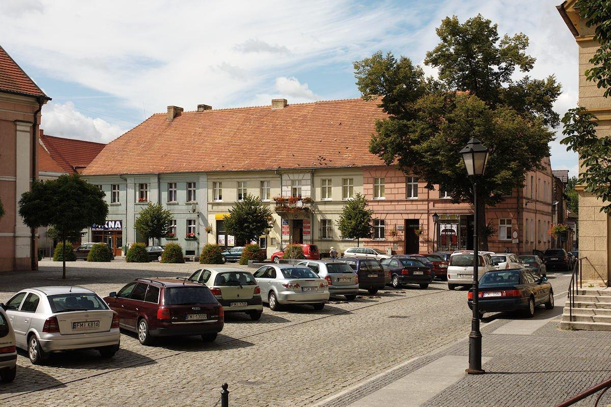 Zabudowa zachodniej strony Rynku.